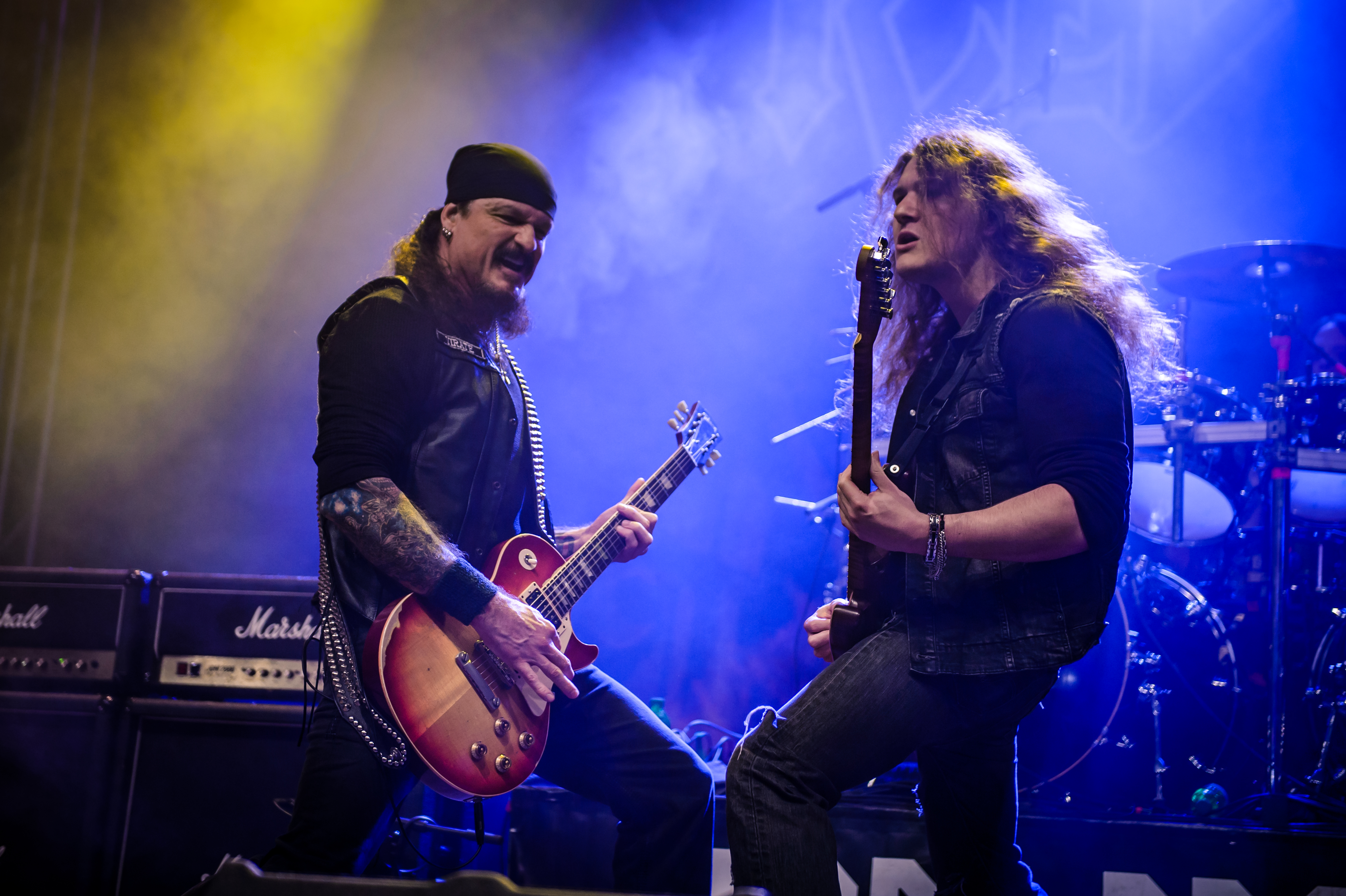 'Dong Open Air 2017; Neukirchen-Vluyn': 'Iced Earth'